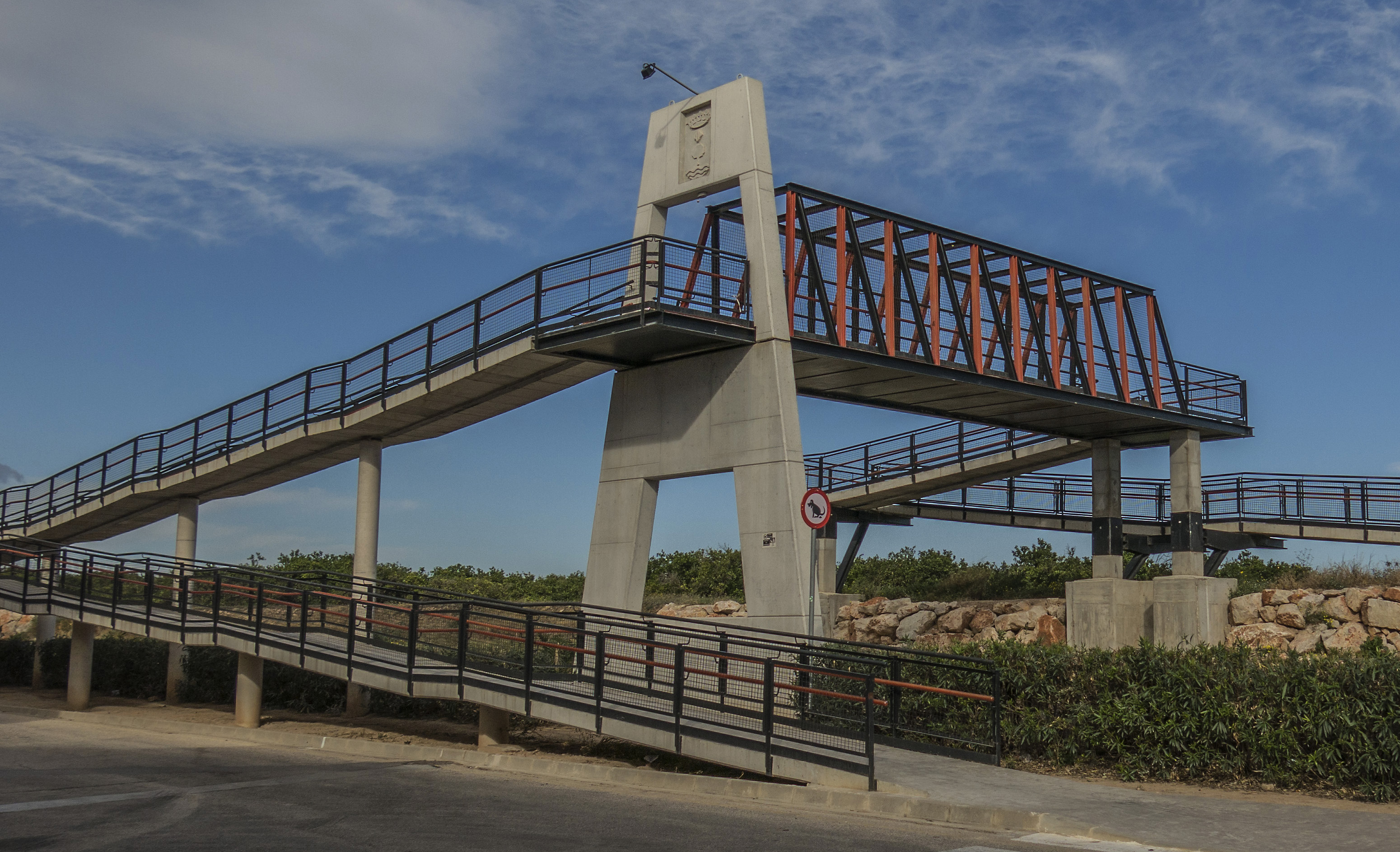 Polinyà de Xúquer és un municipi del País Valencià situat a la comarca de la Ribera Baixa.